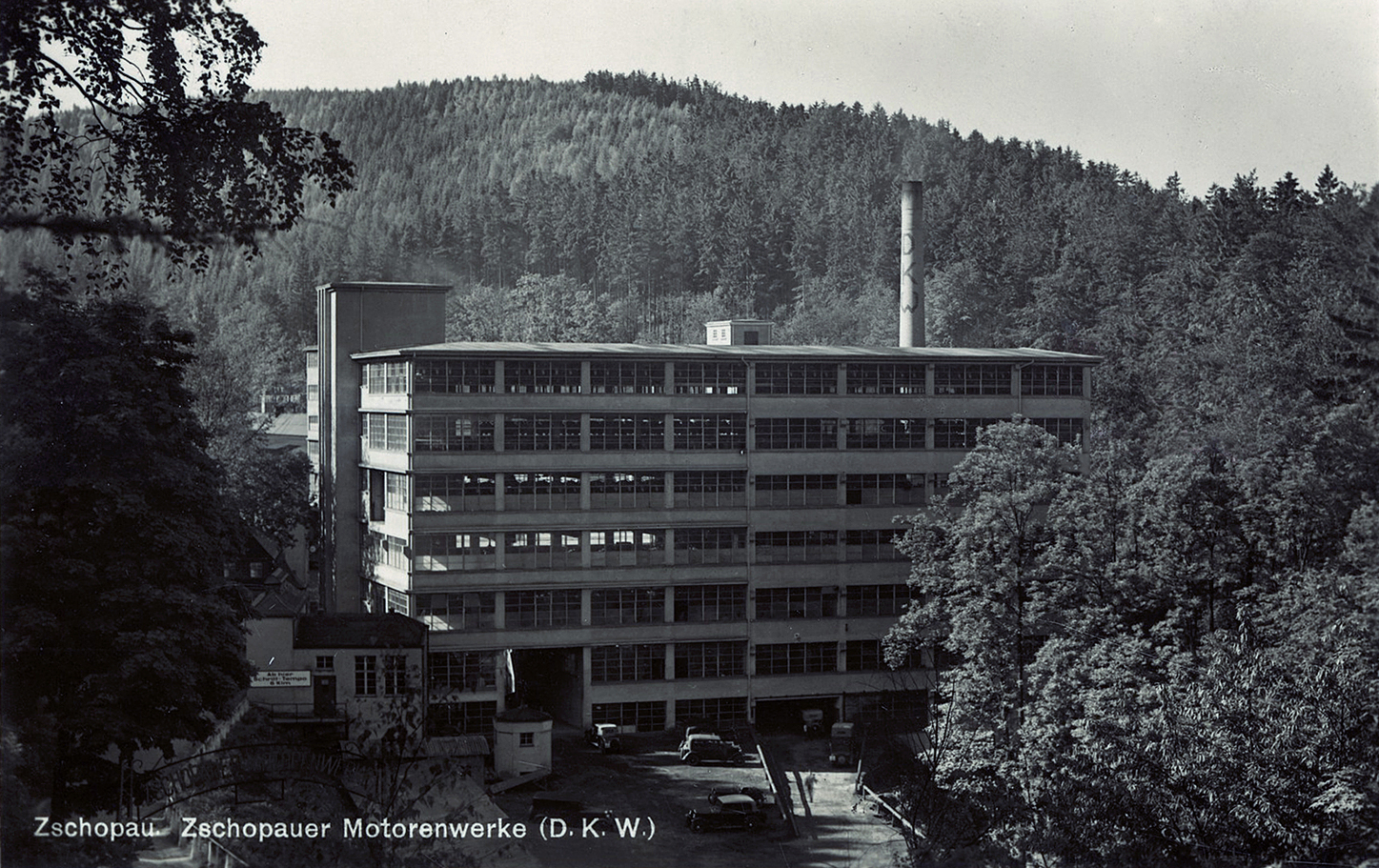 Zschopau; DKW - Motorradwerke. Eine Beschädigung des gescannten Fotos rechts am Gebäude wurde retuschiert. Das tatsächliche Aussehen war im Detail dabei nicht bekannt, die Ergänzung ist zum Teil spekulativ, die Grenze zwischen Originalfoto und Bild-Erfindung des Retuscheurs ist nicht erkennbar. This postcard is from publisher Brück & Sohn in Meißen ( postcard has a unique number 25972 and is available in a higher resolution at the publisher. This images was uploaded in a cooperation project between Wikipedians and the publisher.